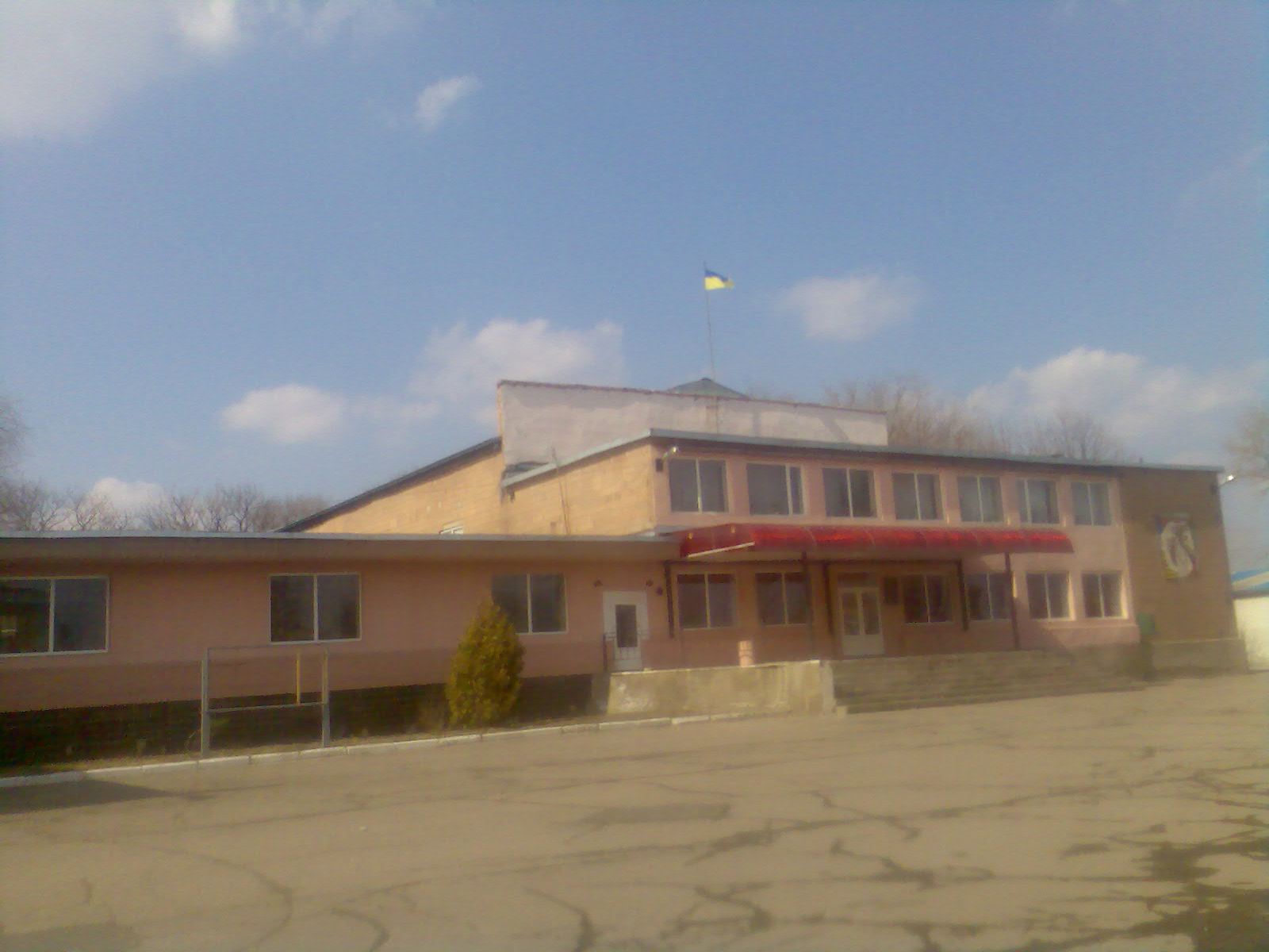 Золочевский историко-краеведческий музей